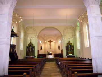 Nef rénovée de l'Eglise Saint-André de Joncherey